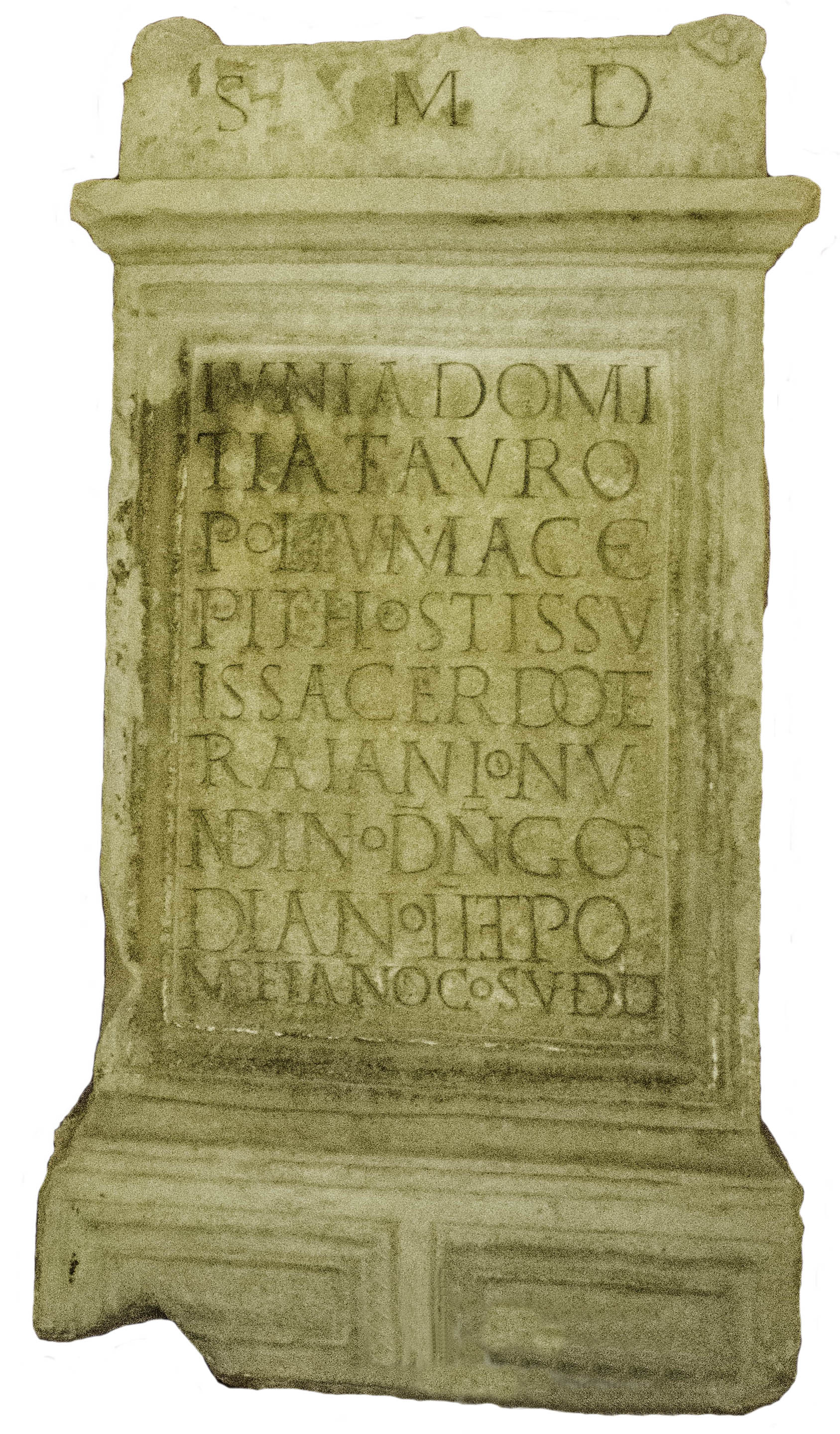 Autel taurobolique de Iunia Domitia, 241 ap. JC, marbre. Musée Eugène-Camoreyt de Lectoure, Gers, France.